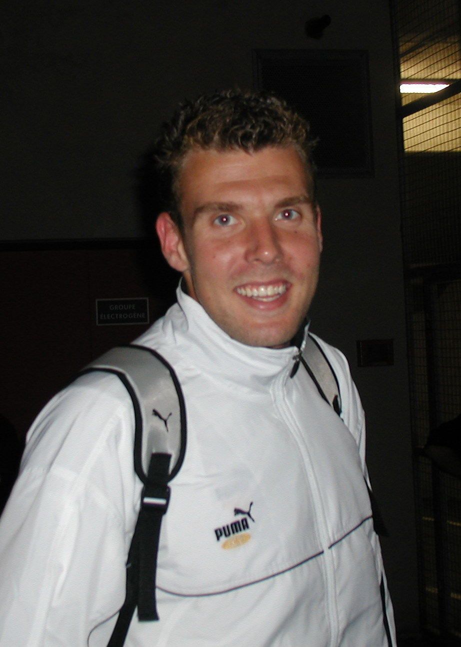 Damien Gregorini en 2002 sous les couleurs de l'O.G.C.Nice